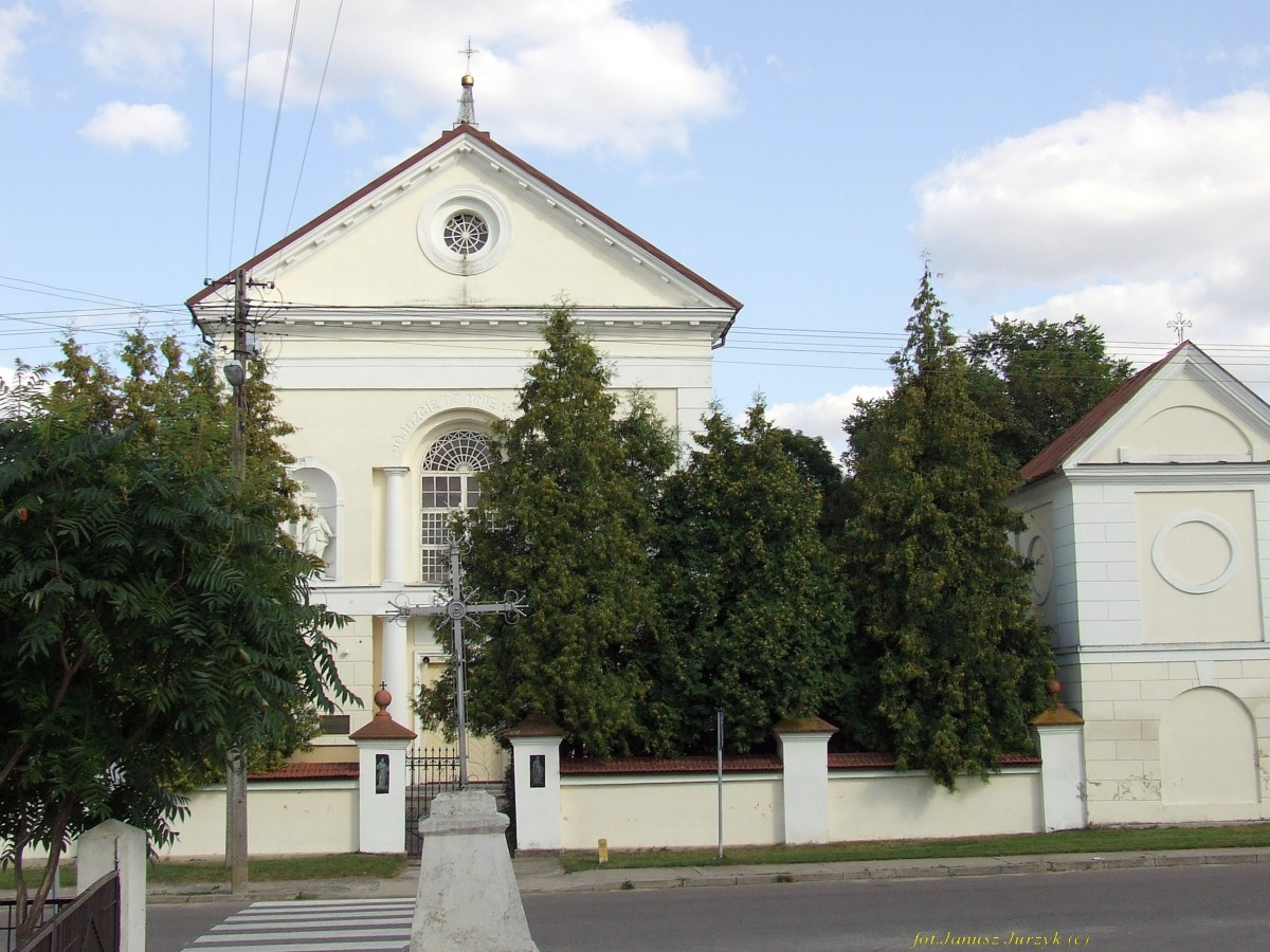 Kościół pw. św. Mikołaja. 03.1962.